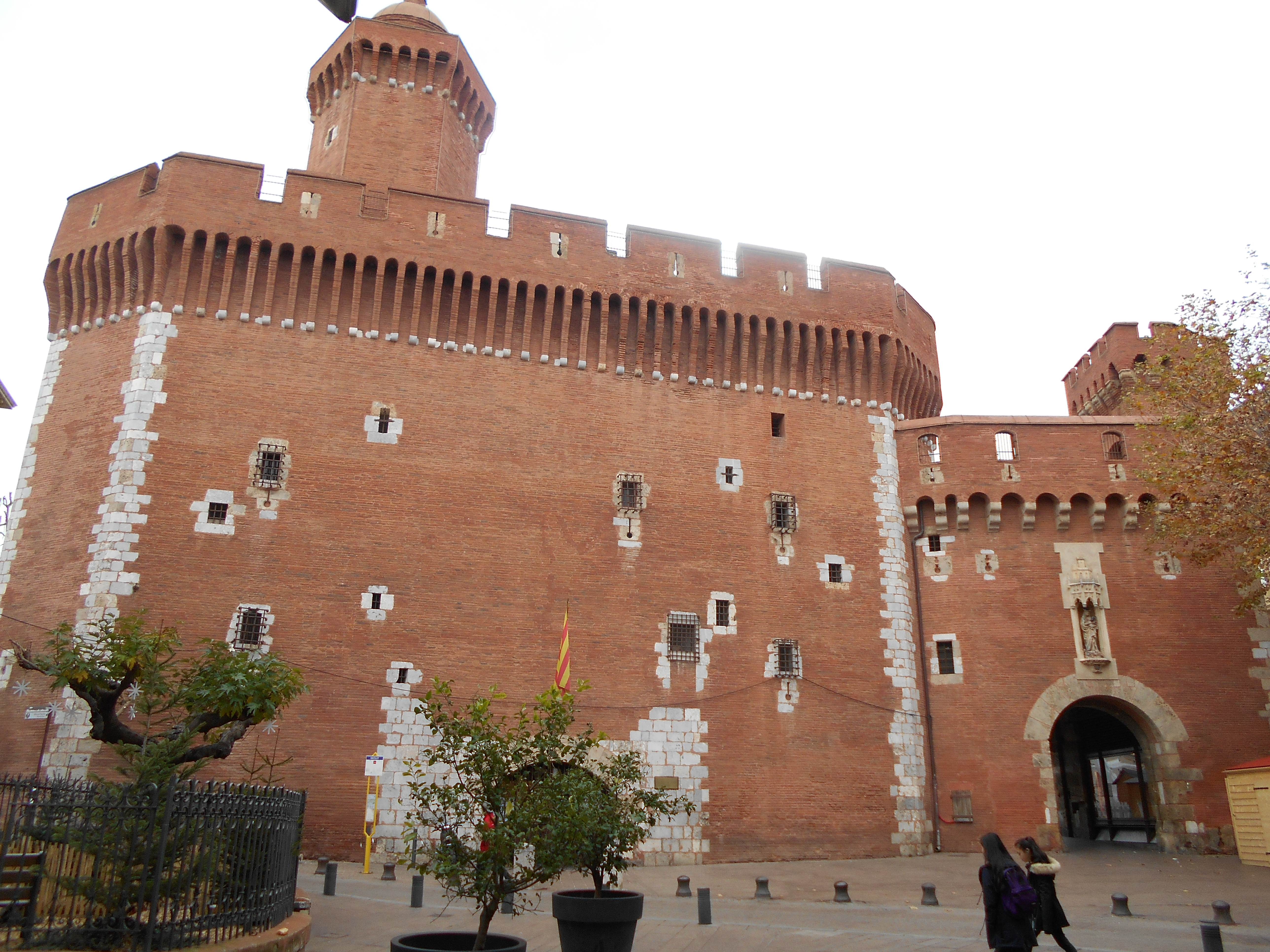 El Castellet des del sud